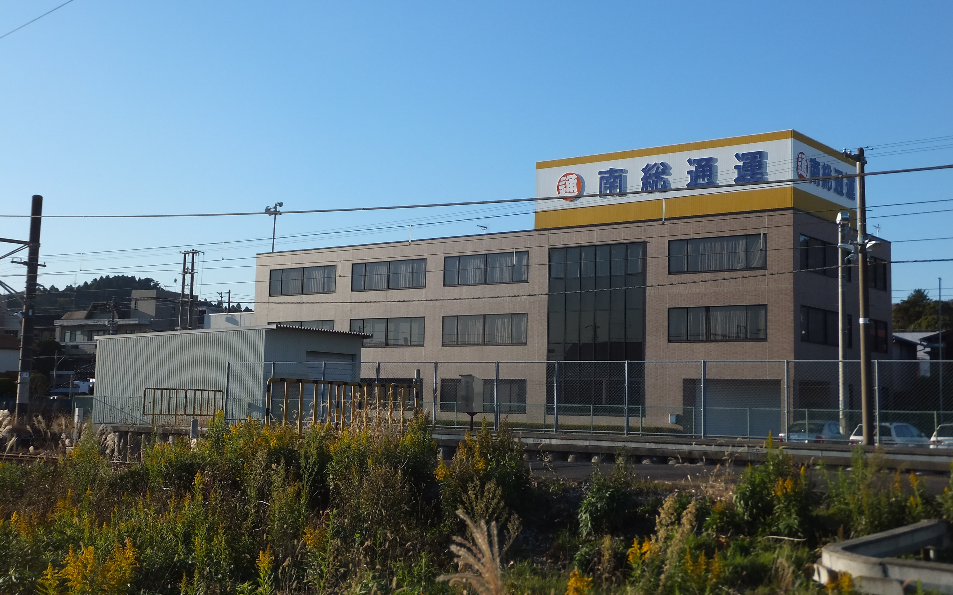 南総通運本社(千葉県東金市)